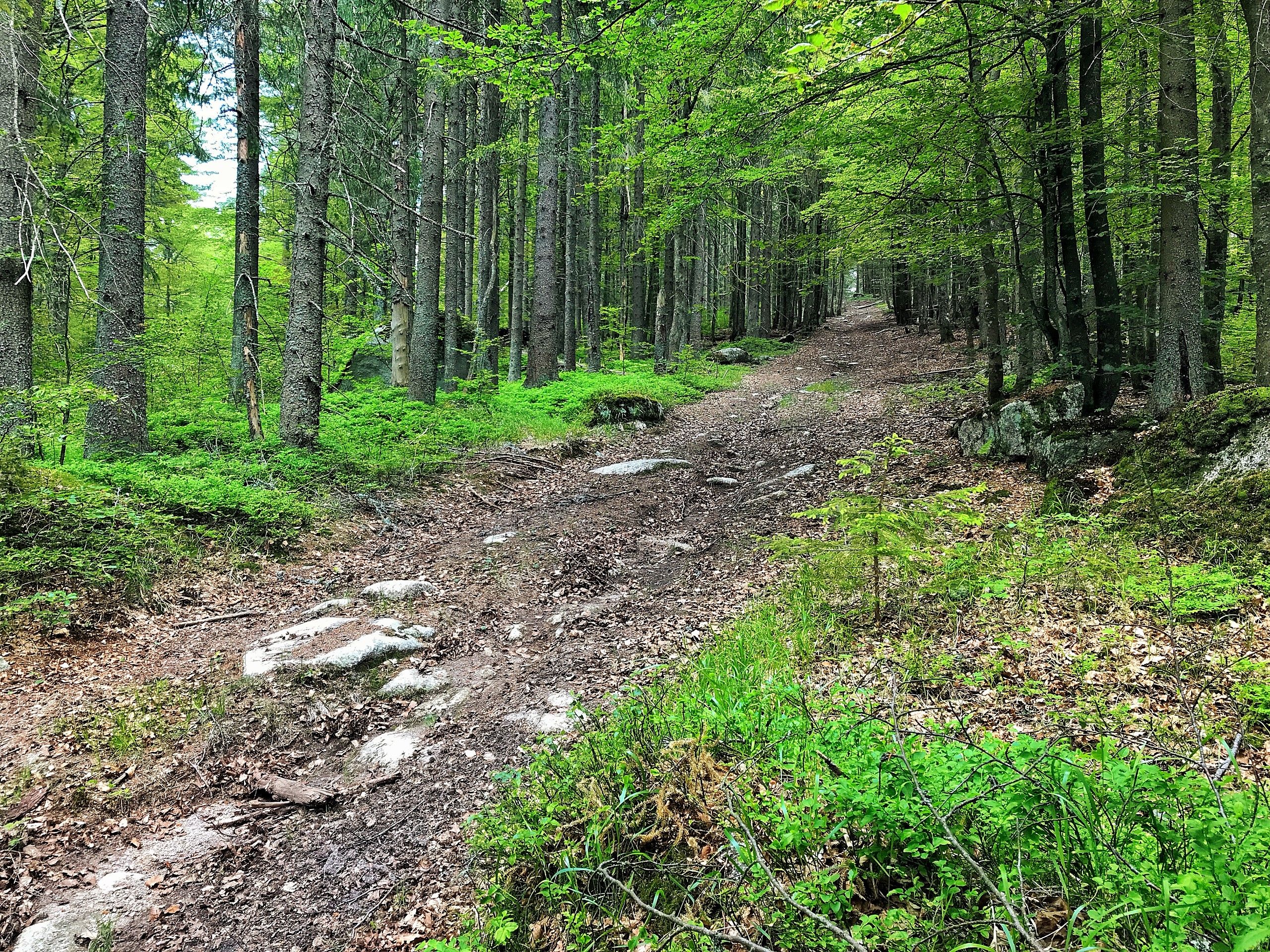 Cesta na šumavský Strážný (1115 m)